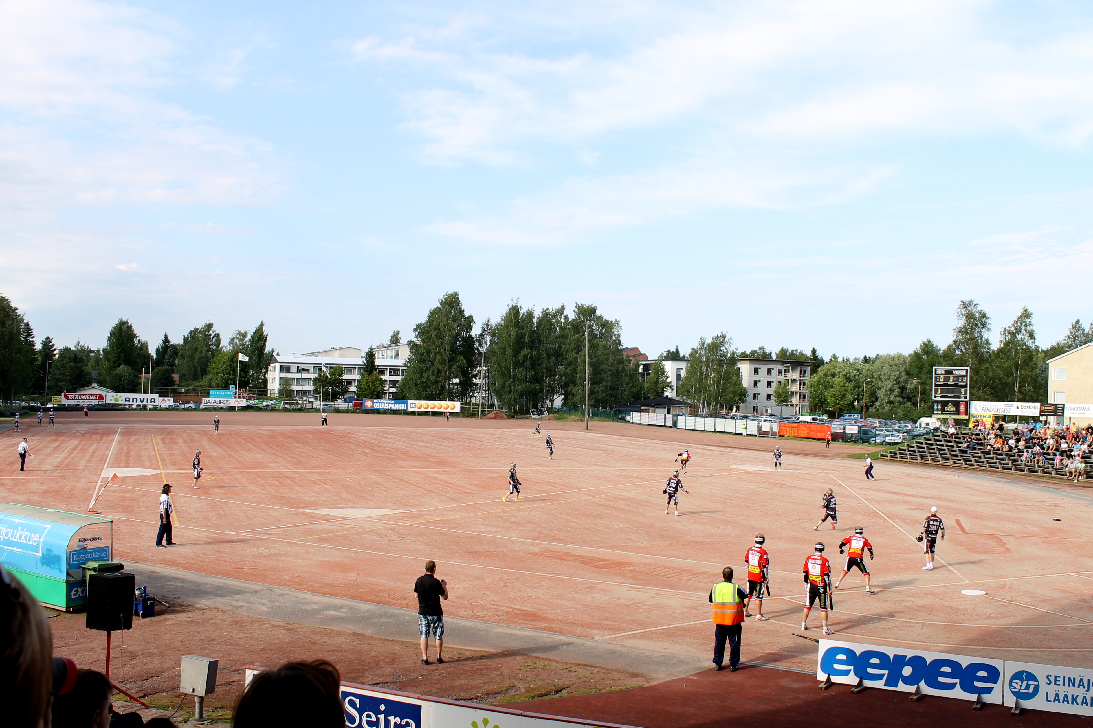 Ilkka-areenan kenttä Superpesis-ottelussa elokuussa 2013